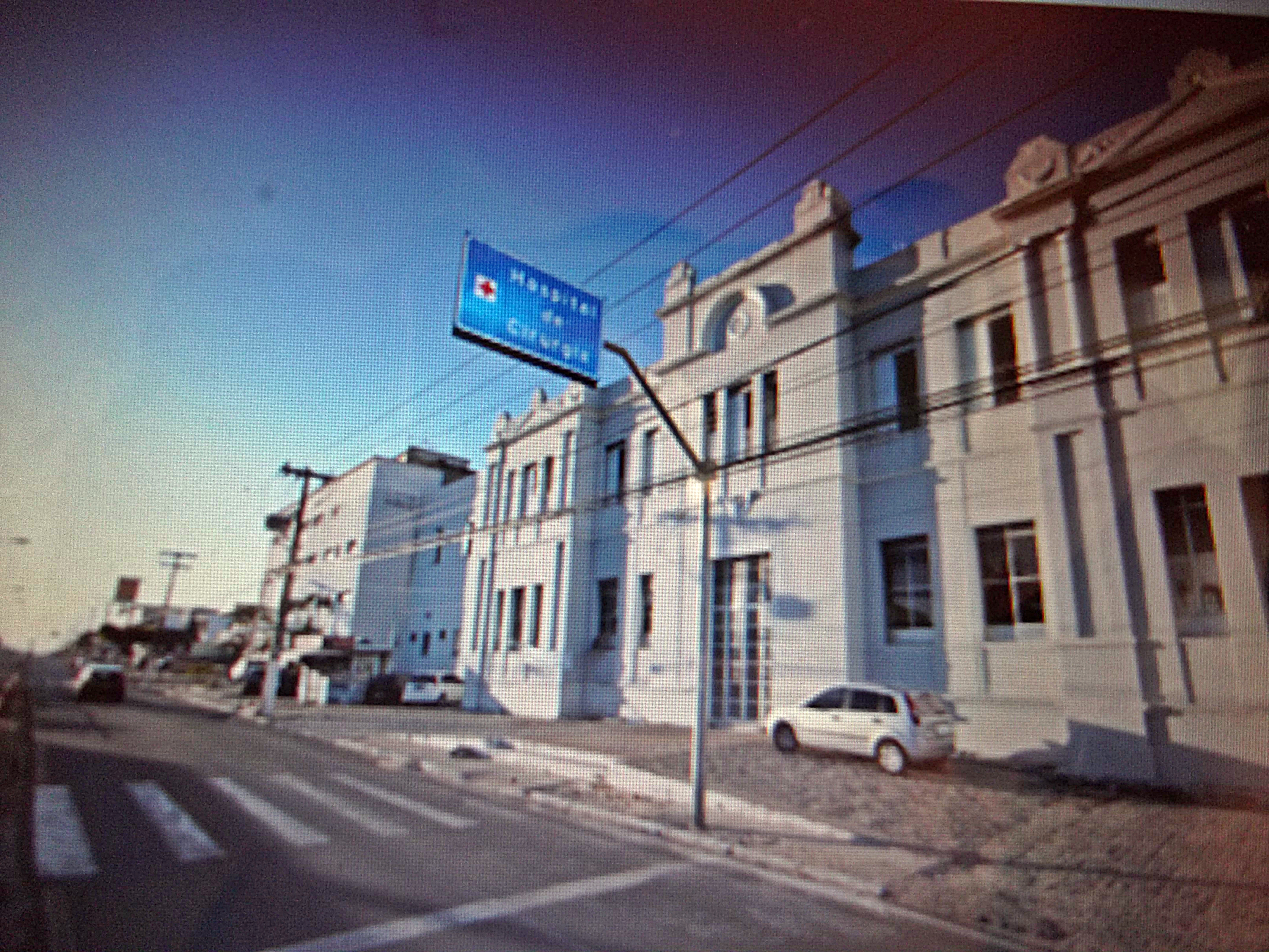 Hospital de Cirurgia-Aracaju-SE, 2012